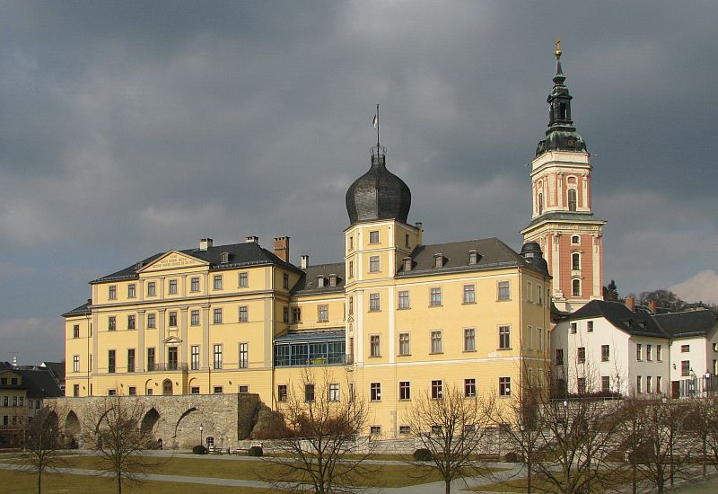 Greiz Schloss Unteres Schloss mit Stadtkirche St. Marien Foto 2009 Wolfgang Pehlemann Wiesbaden IMG_0791